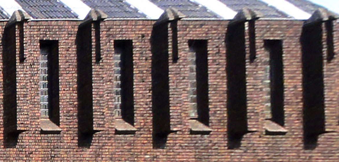 Gereformeerde kerk in Appingedam, detail van de westmuur